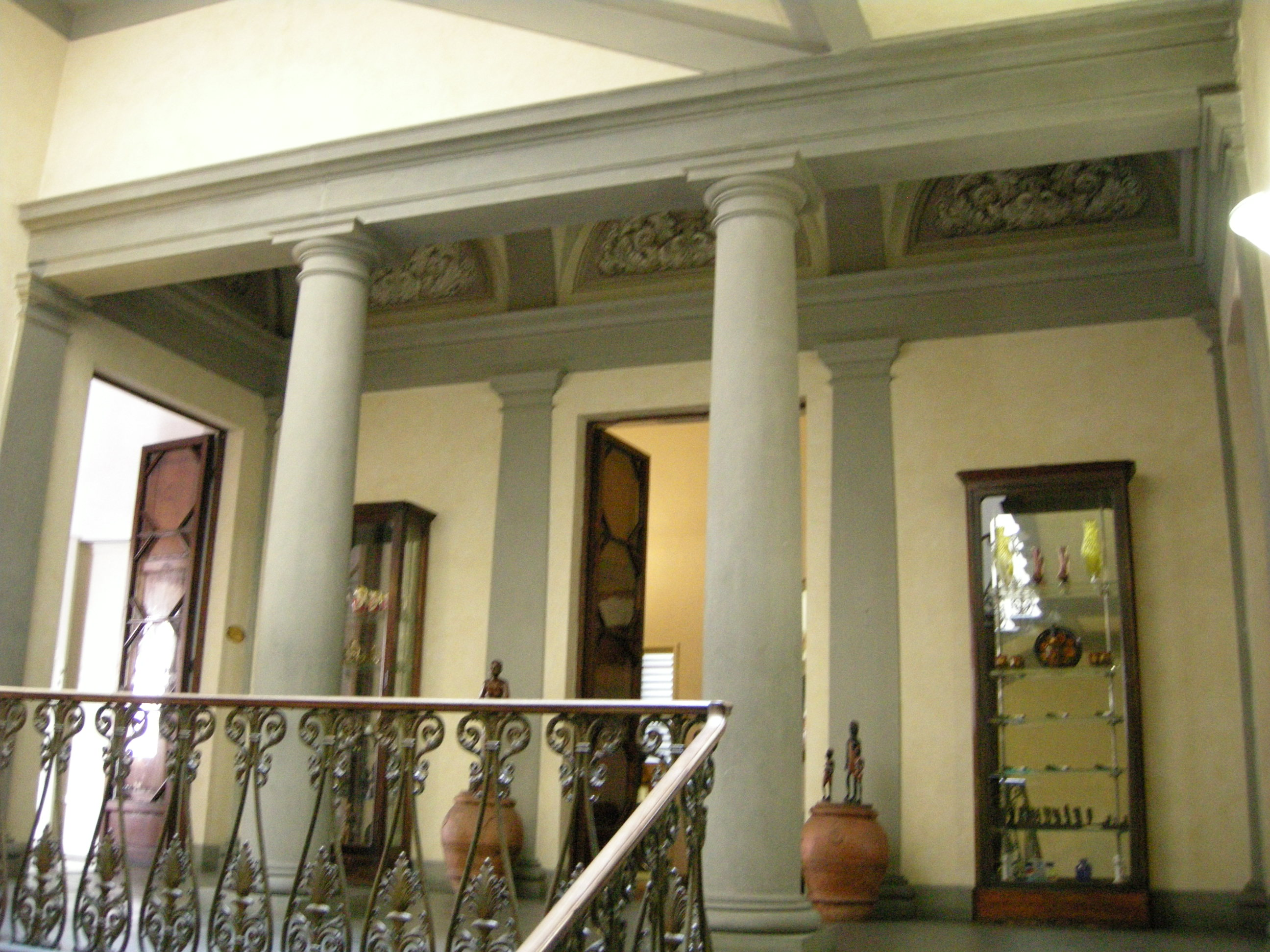 Palazzo rospigliosi pallavicini, scale